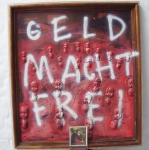 Jacek Wesołowski "GELD MACHT FREI"